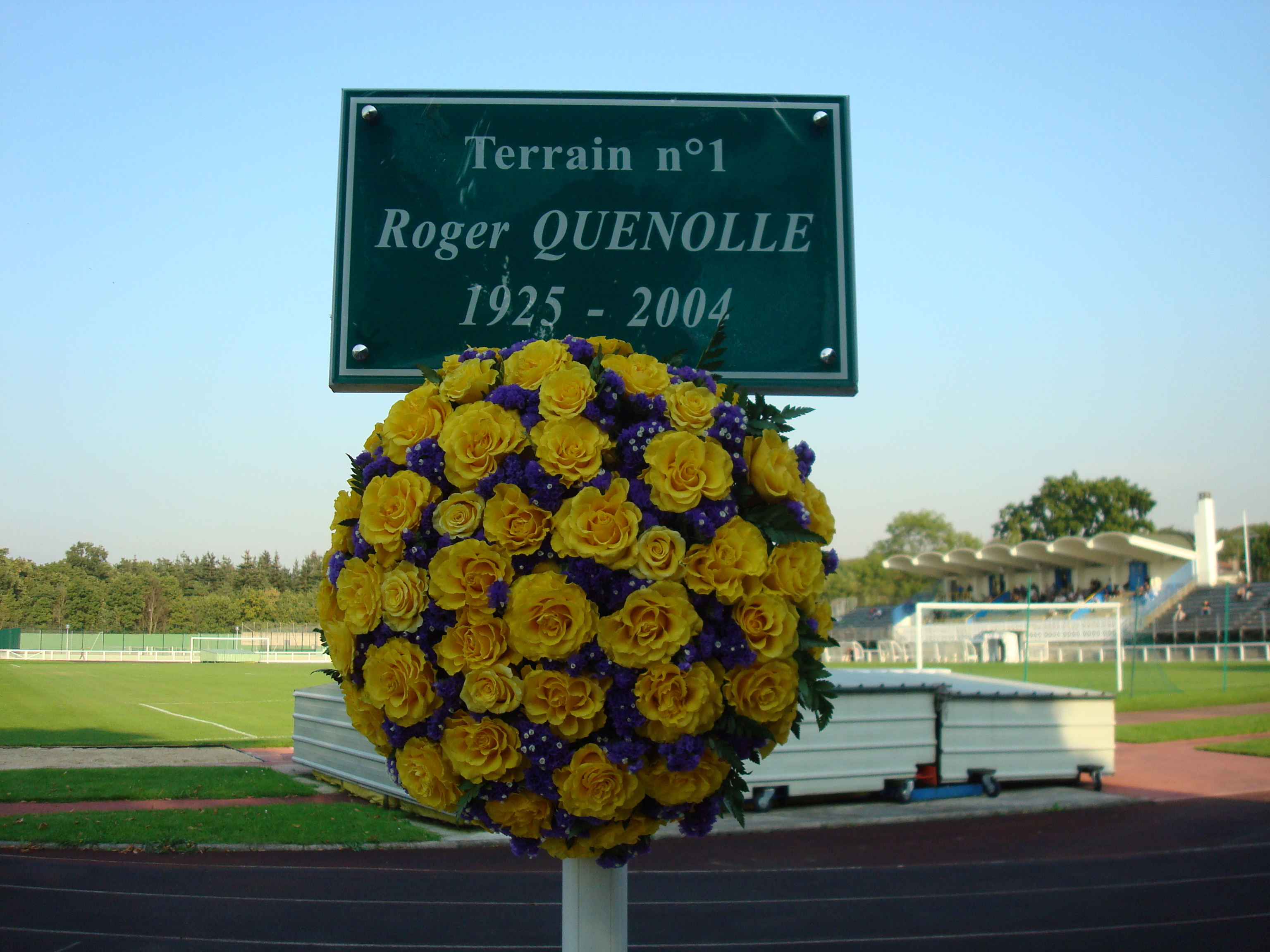 Hommage à Roger Quenolle lors du match de CFA Poissy- PSG B le samedi 22 septembre 2007.